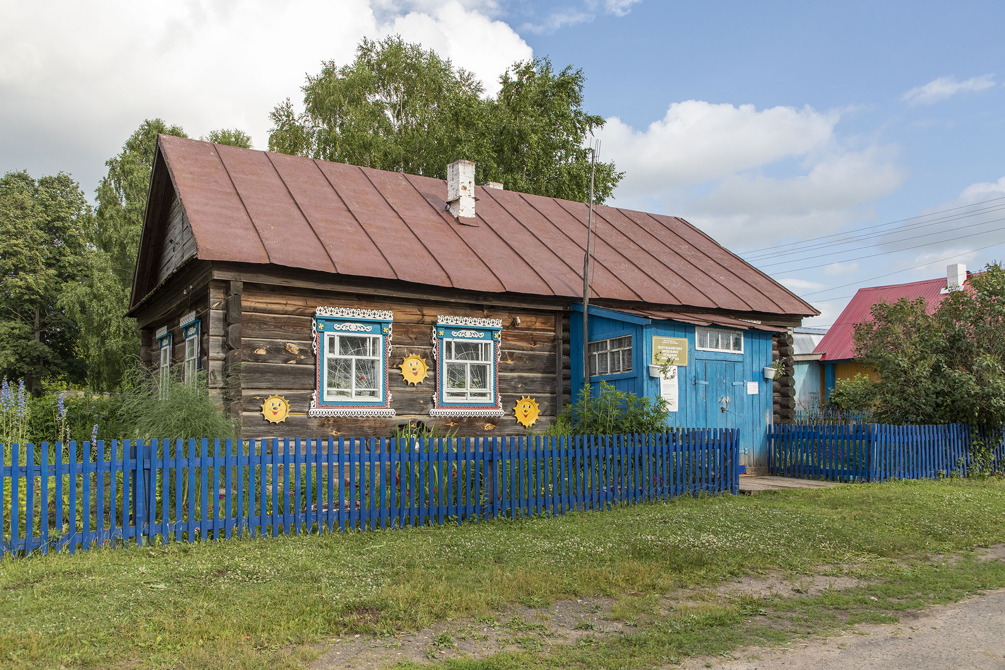 Šorunža küla Marimaal